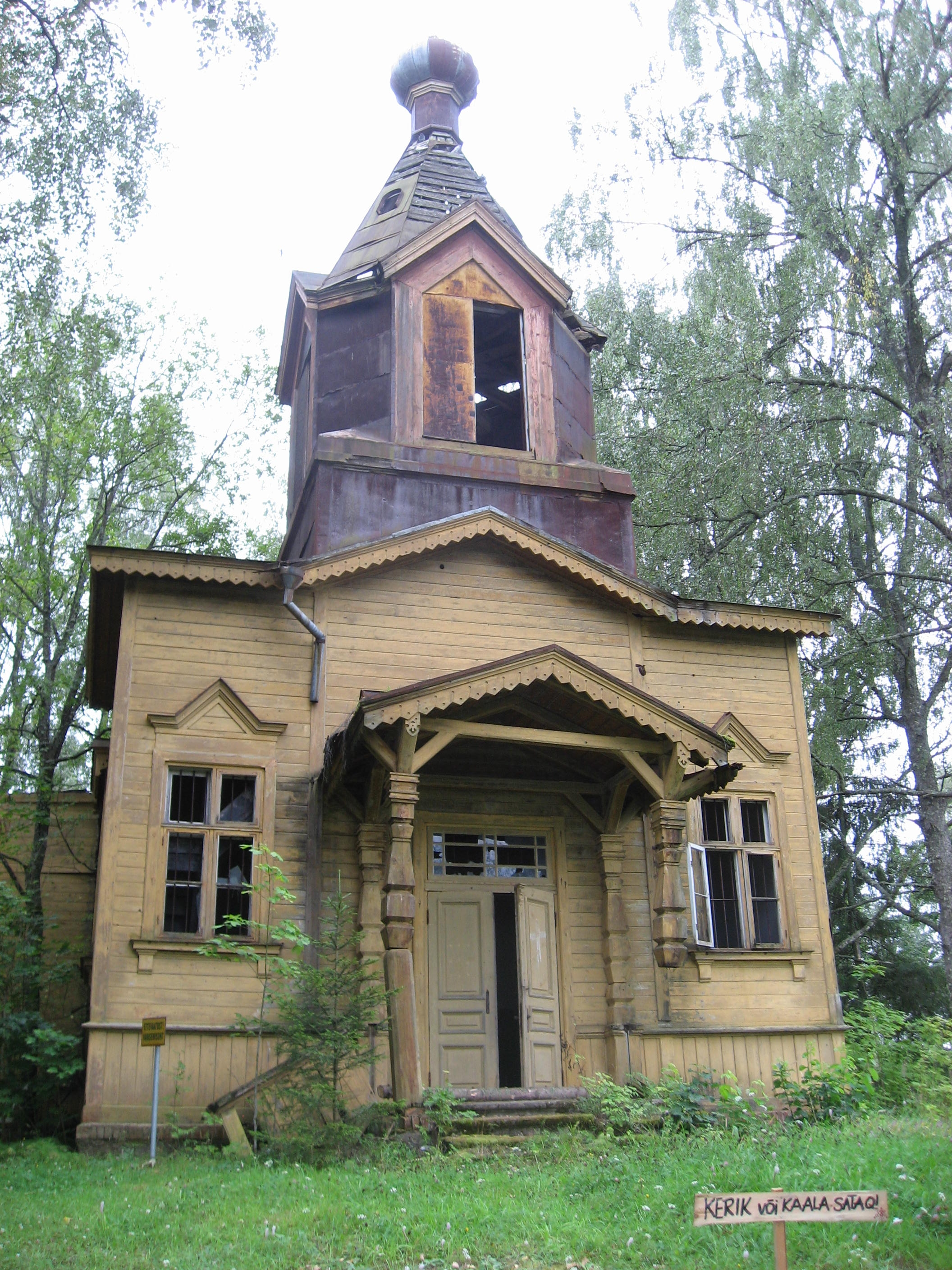 Võro: Kaika kerik